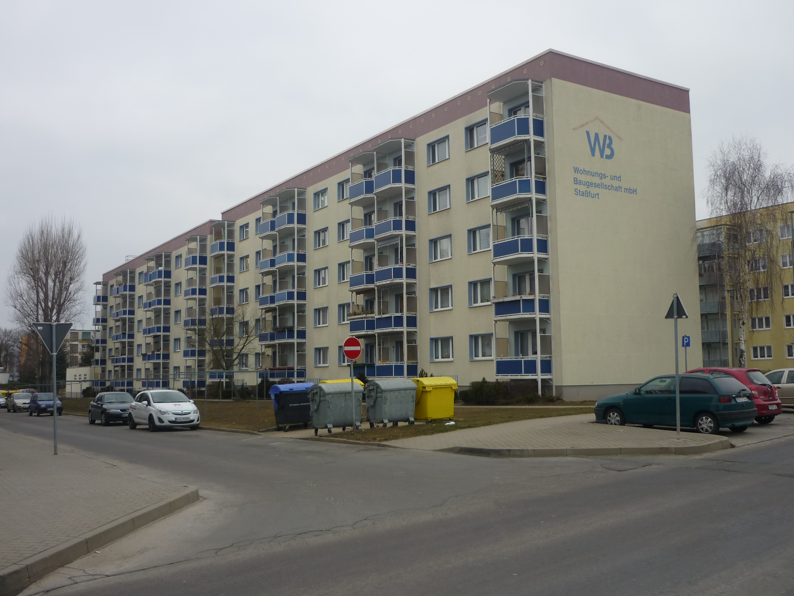 WOBLST